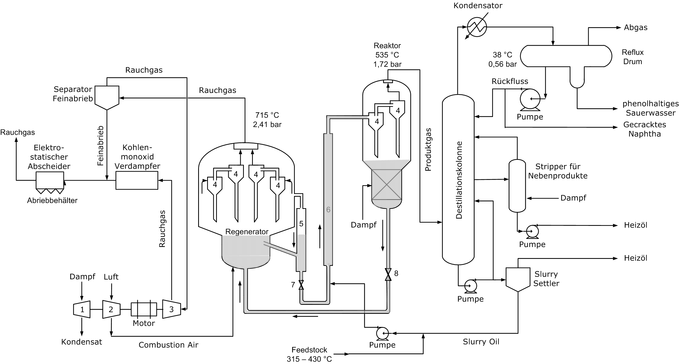 Cracken, FCC